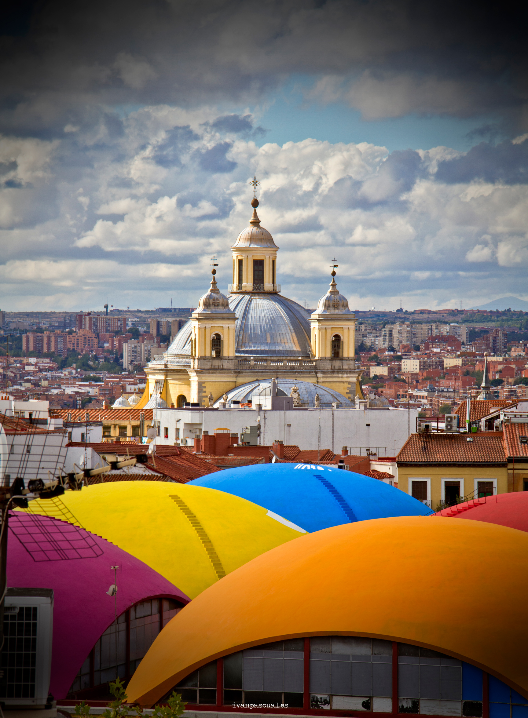 Vista de la Real Basílica de San Francisco el Grande con las cúpulas del Mercado de la Cebada